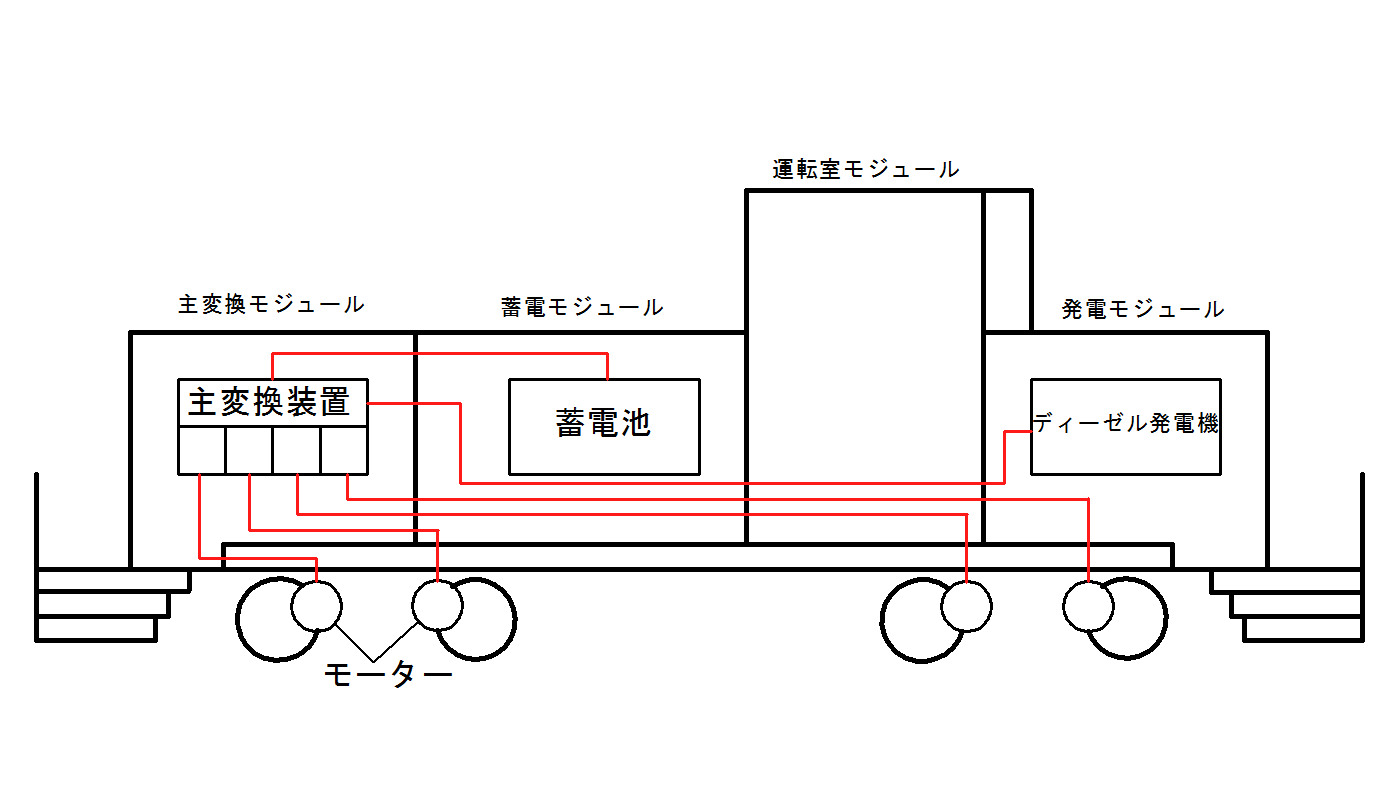 HD300形ハイブリットディーゼル機関車のエンジンと各機器の配置とそれを繋ぐ配線の見取り図。